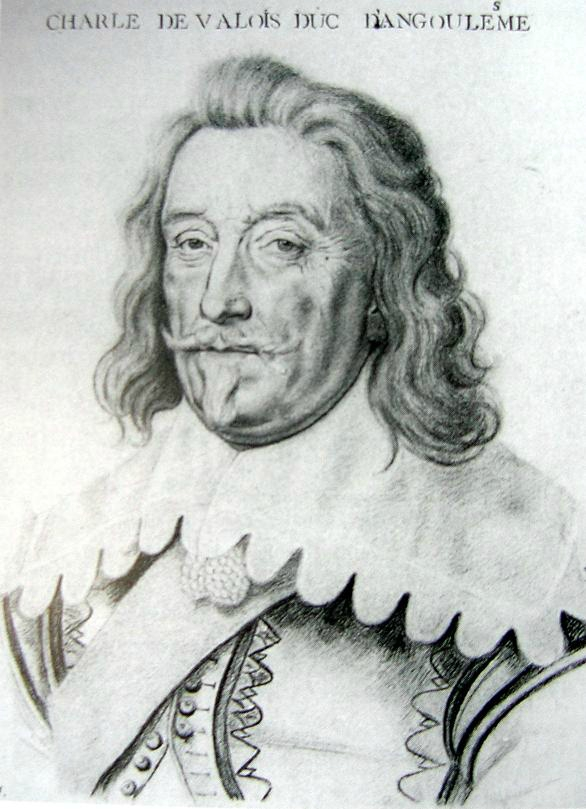 Portrait de Charles de Valois, duc d'Angoulême. Dessin de Daniel Dumonstier, manoir de Waddesdon, XVIIe siècle.